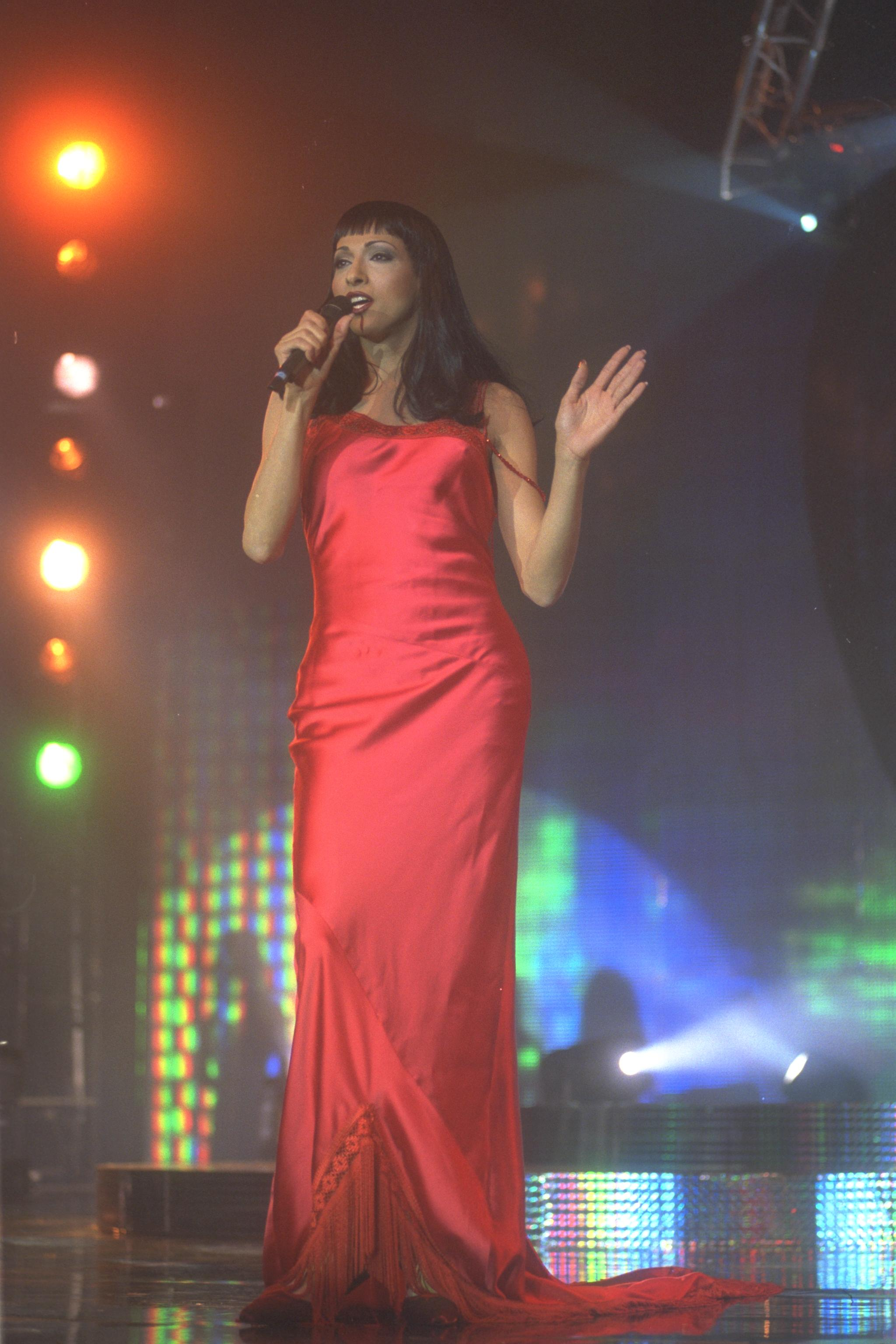 Singer Dana International performing at the Miss Israel 1998 Ceremony at Tel Aviv's Cinerama. דנה אינטרנשיונל בהופעה בתחרות מיס ישראל 1998 בסינרמה בתל אביב